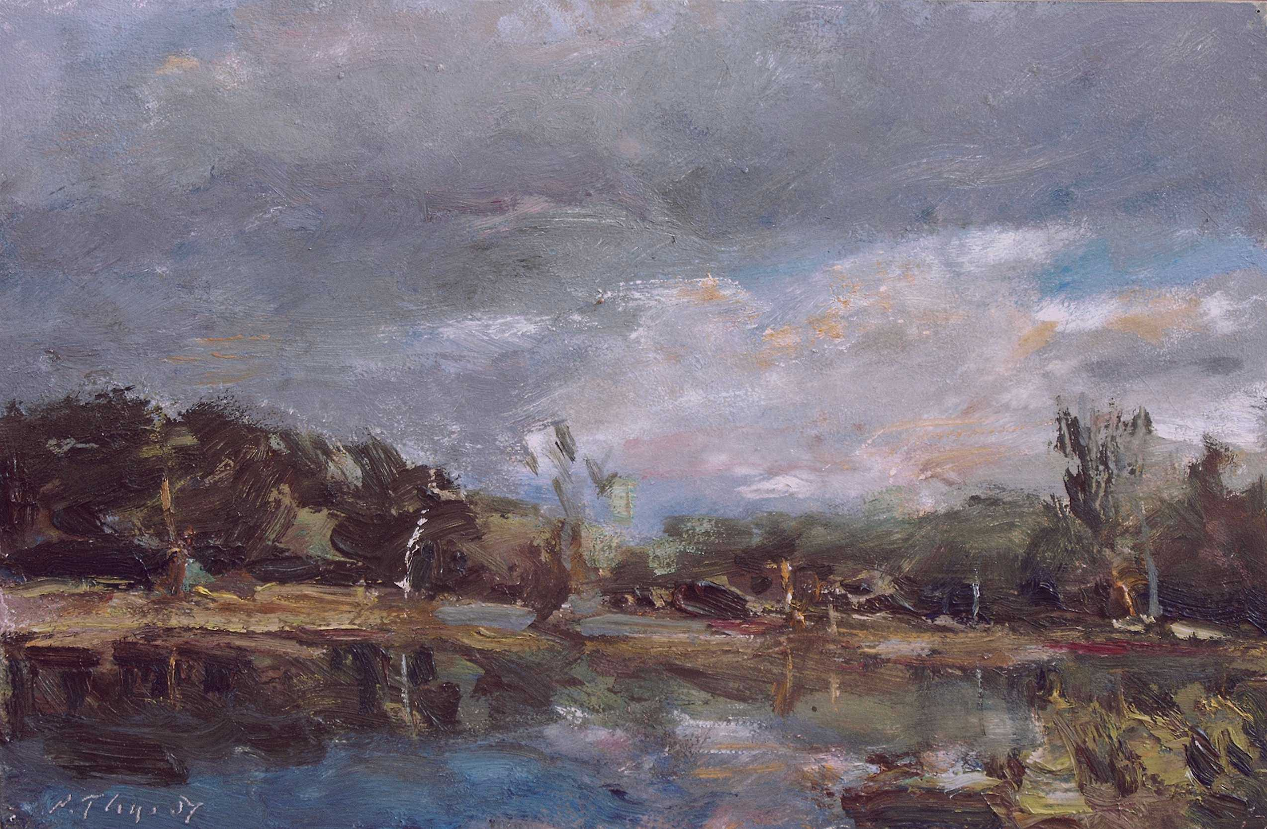 de Kleine Meren Valkenswaard